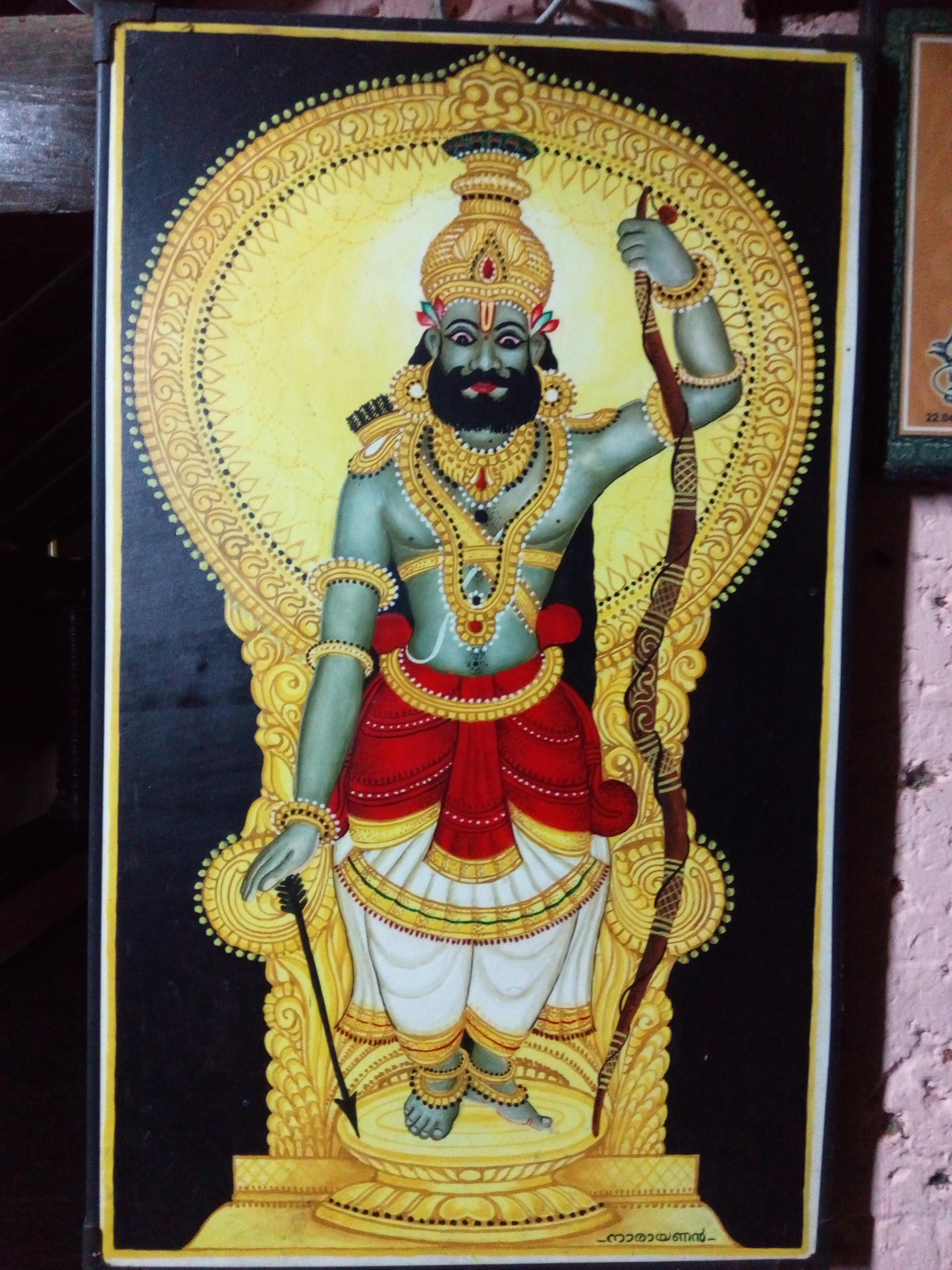 Vettakkaran_kirathamoorthy a photo